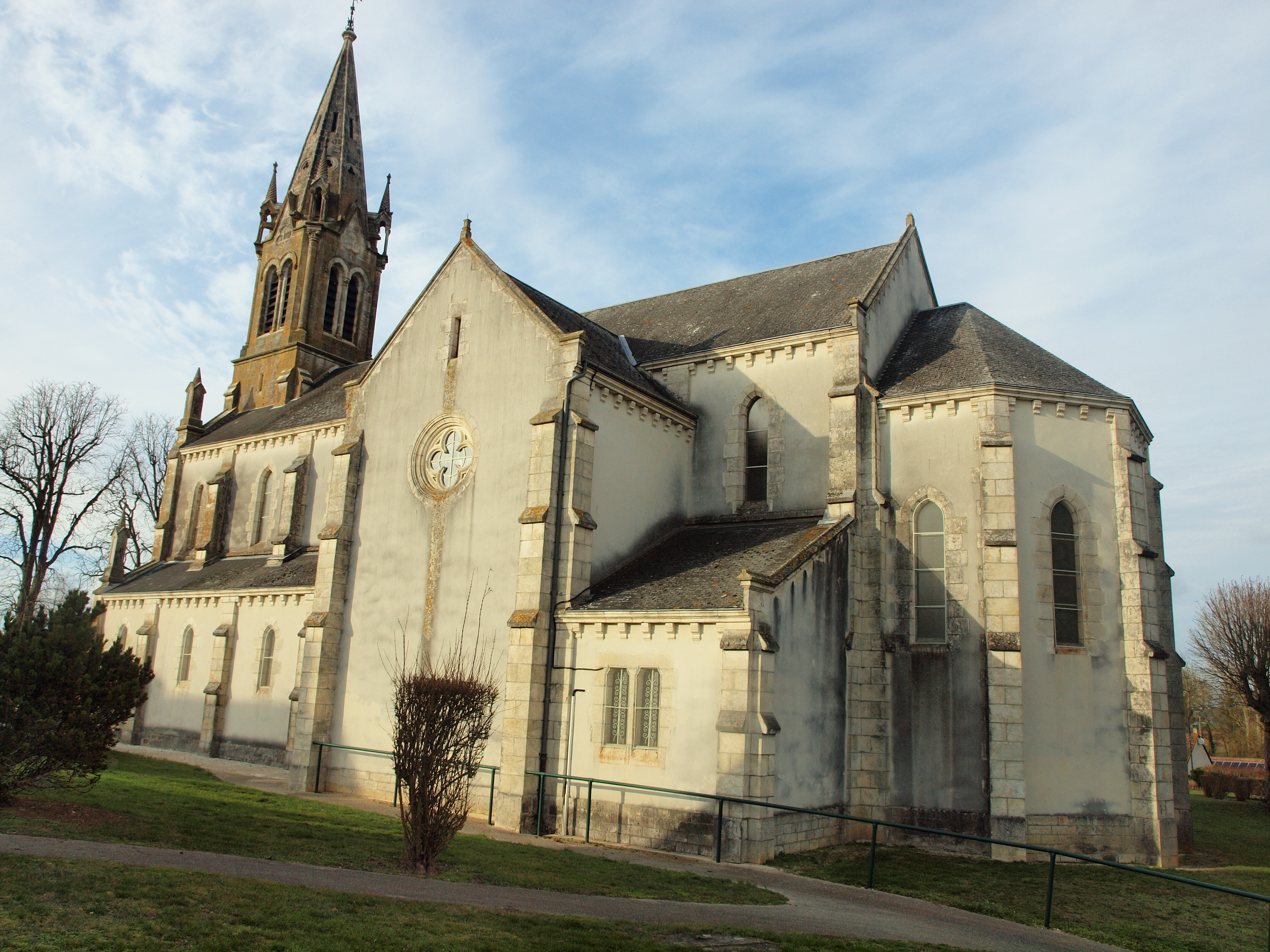 Condé (Indre, France)